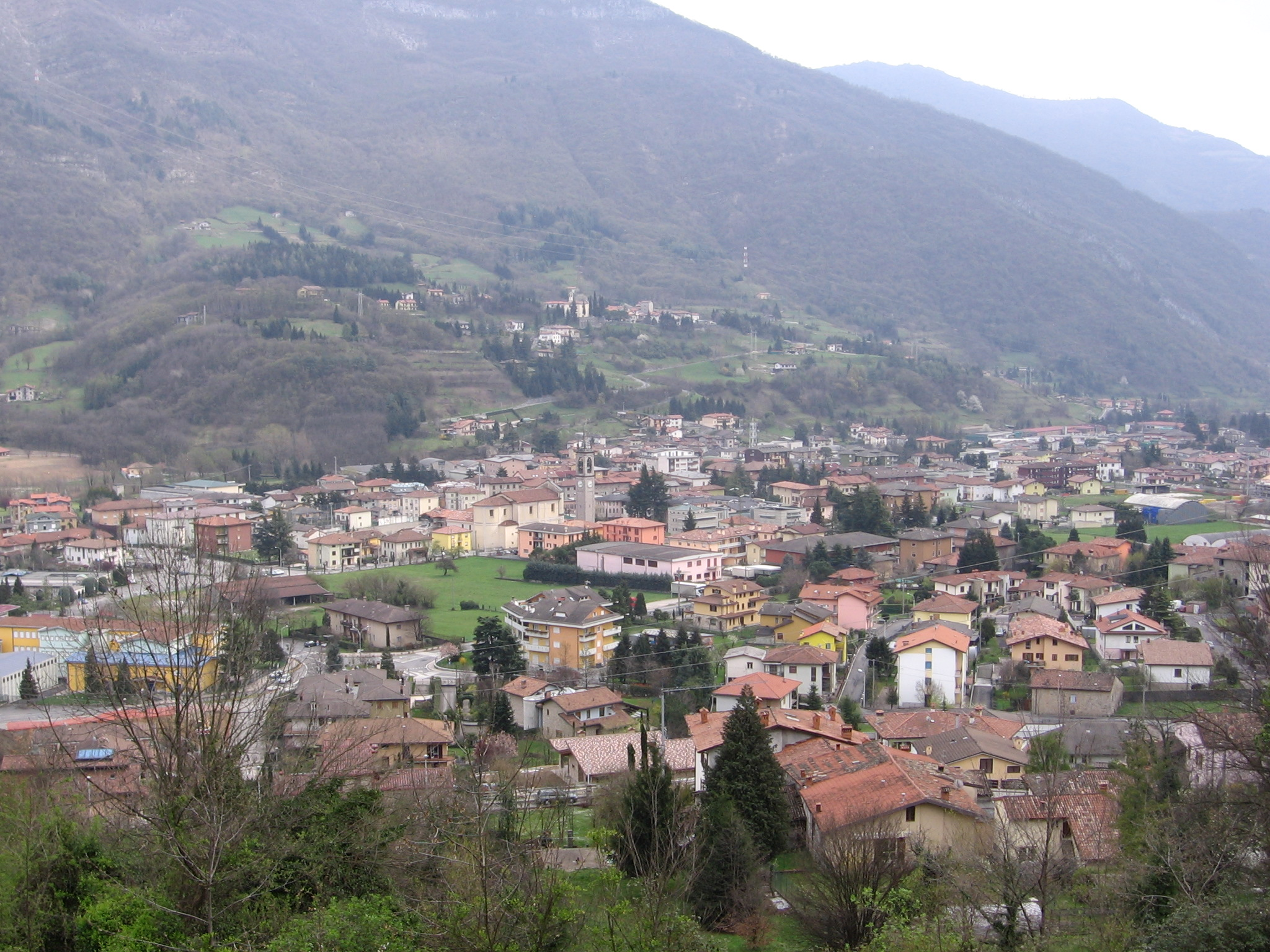 Casazza, Bergamo, Italia